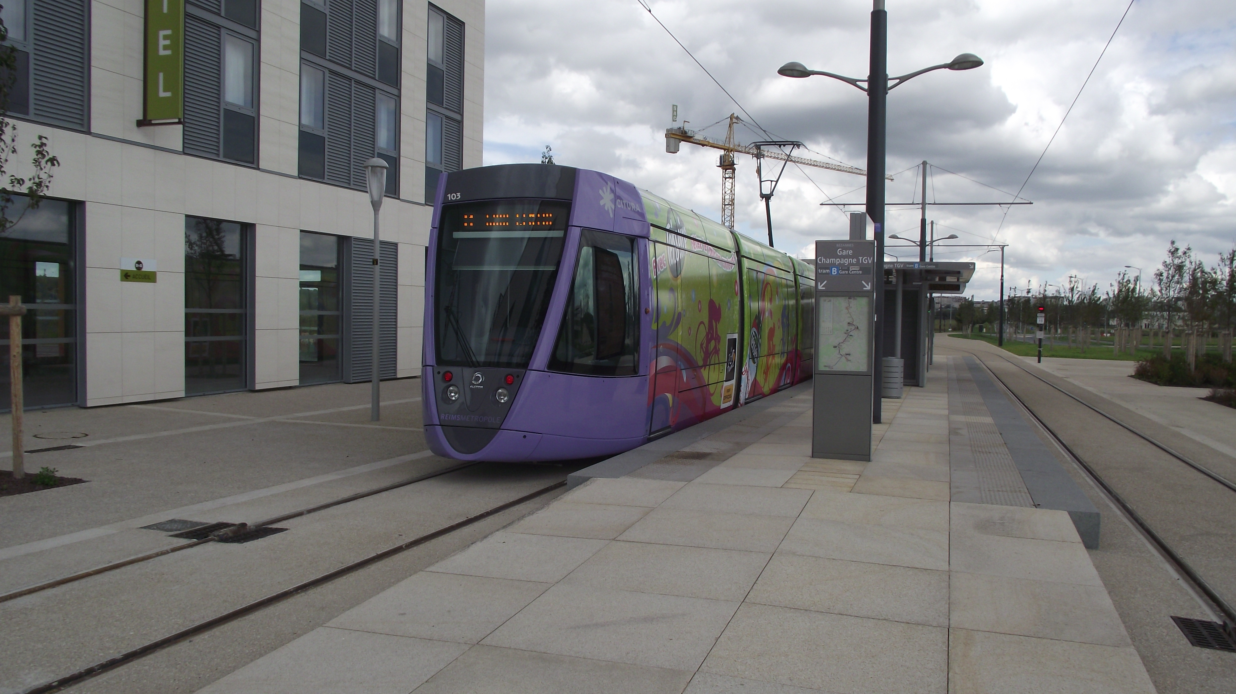 Trameindpunt bij Champagne-Ardenne TGV